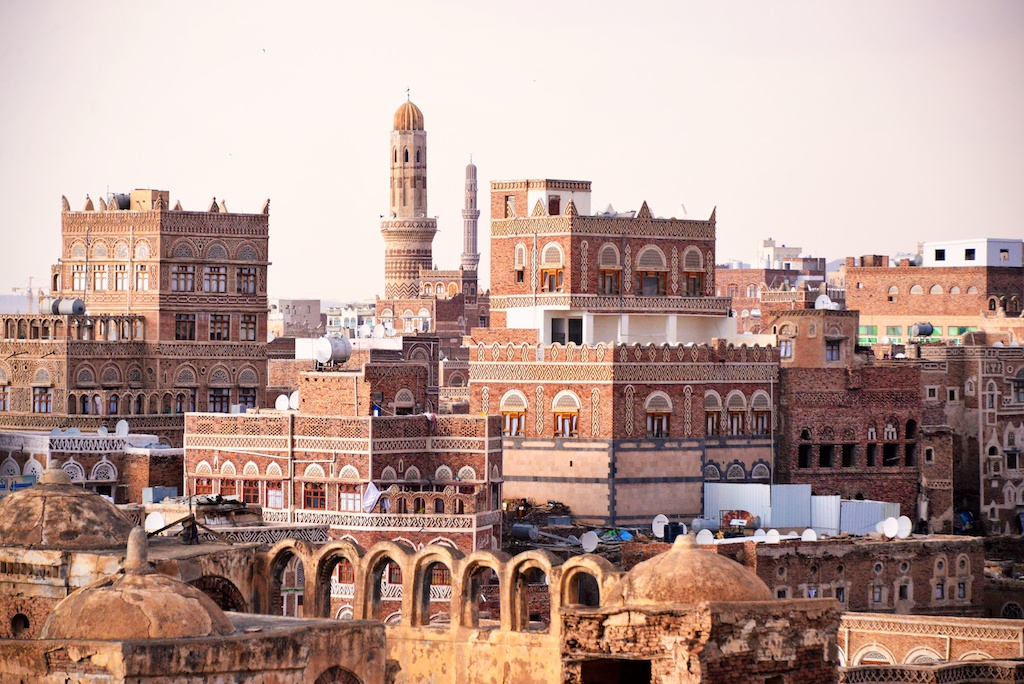 Sana'a, Yemen